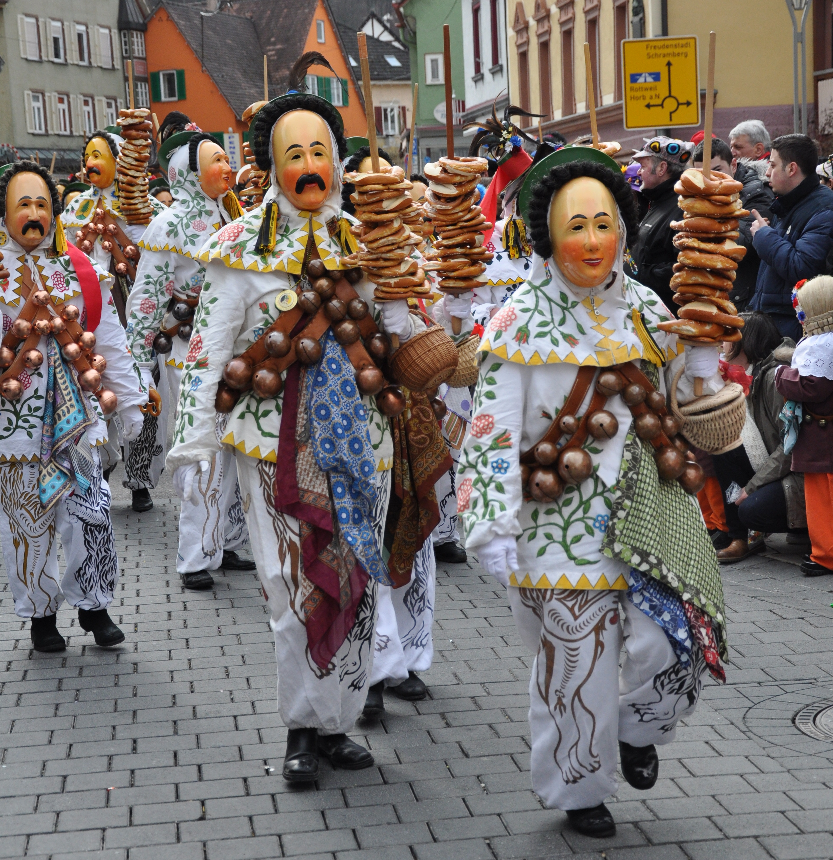 Oberndorf am Neckar, Narrensprung am Fasnetsdienstag nachmittag 2014, Narro